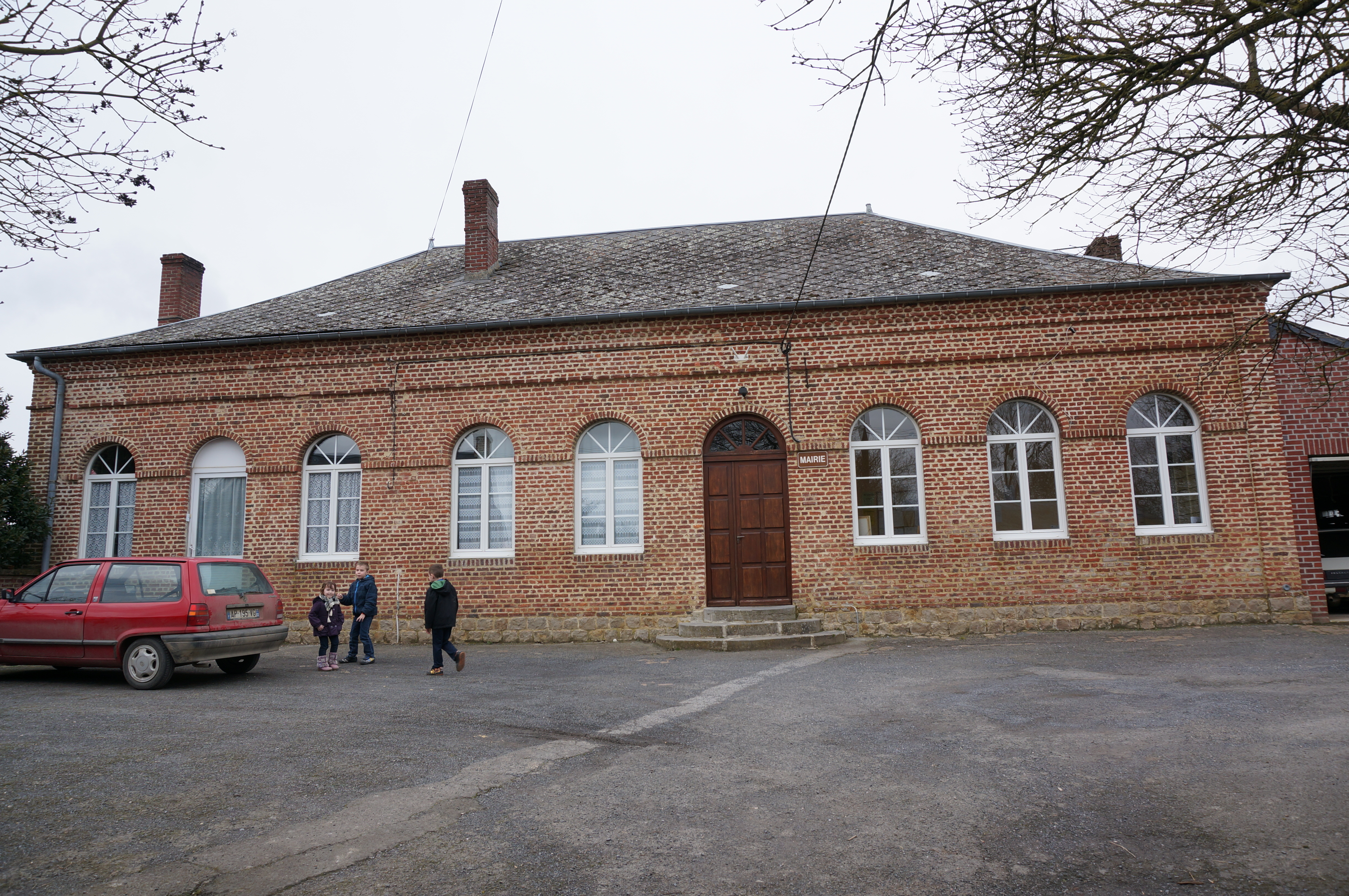 vue de Châtillon-lès-Sons.